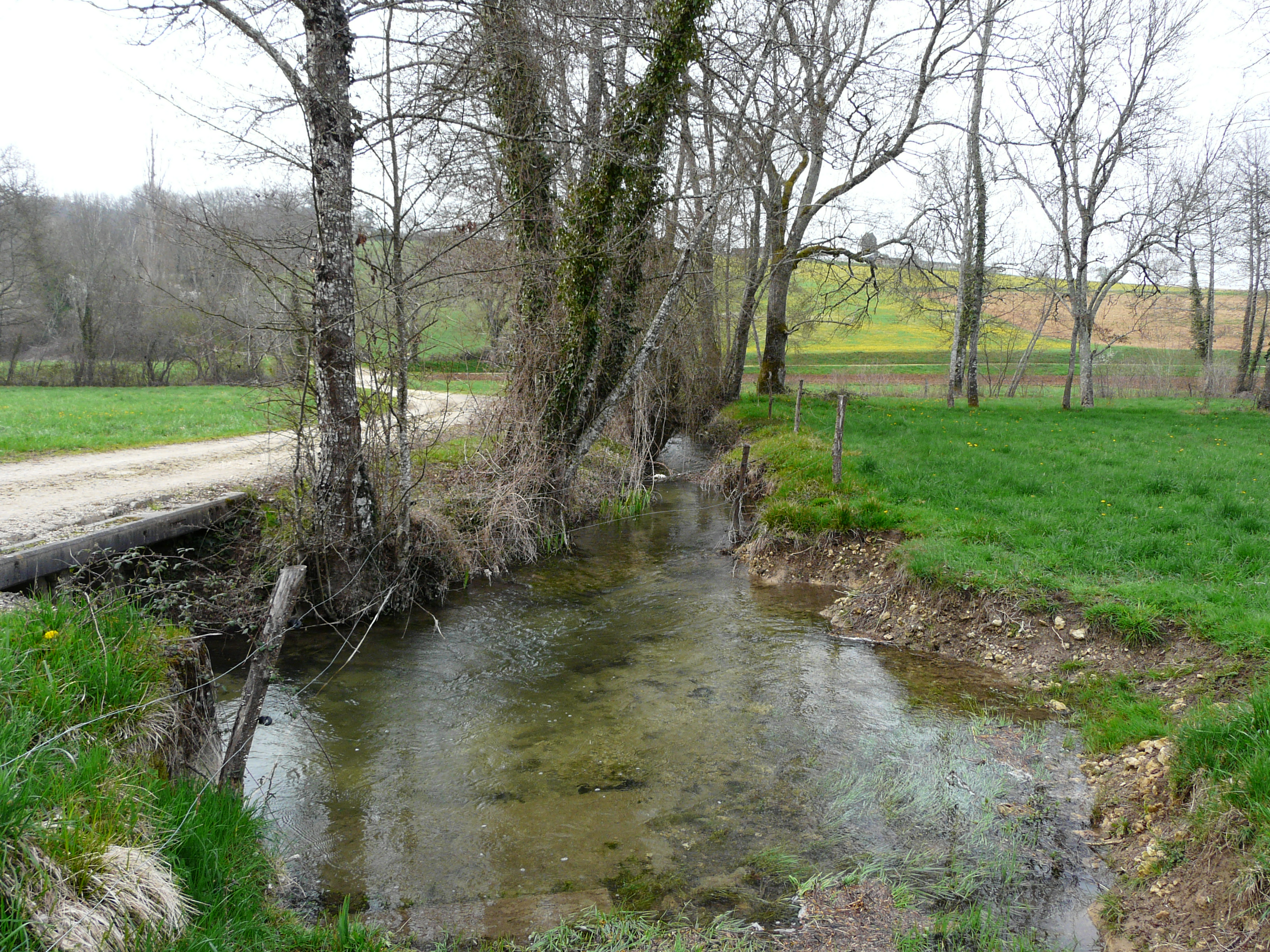 Le Caudeau, à proximité du lieu-dit Guillegorce, marque la limite entre Saint-Amand-de-Vergt (à gauche) et Saint-Laurent-des-Bâtons, Dordogne, France. Vue prise en direction de l'amont.